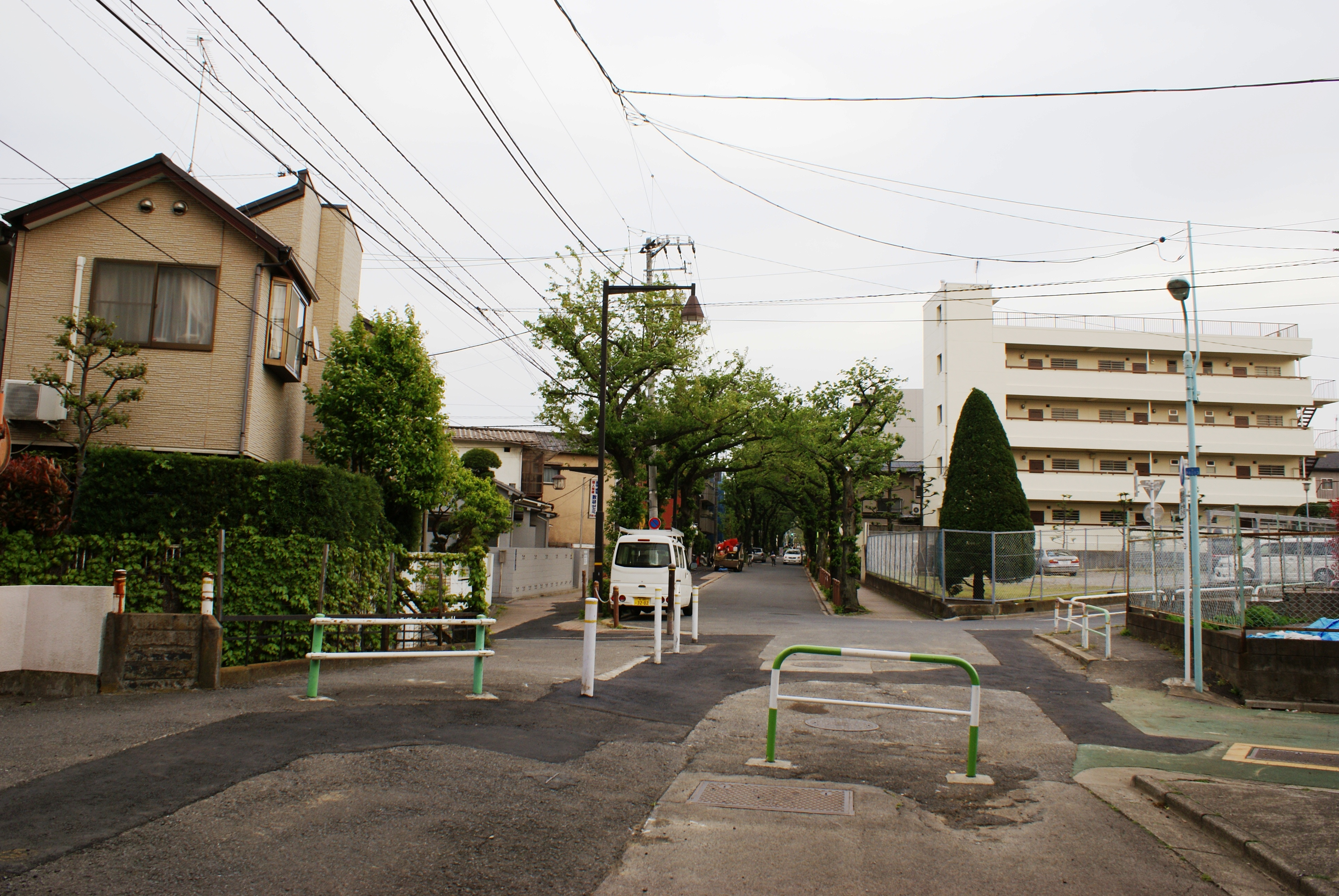 稲荷台トロッコ軌道跡